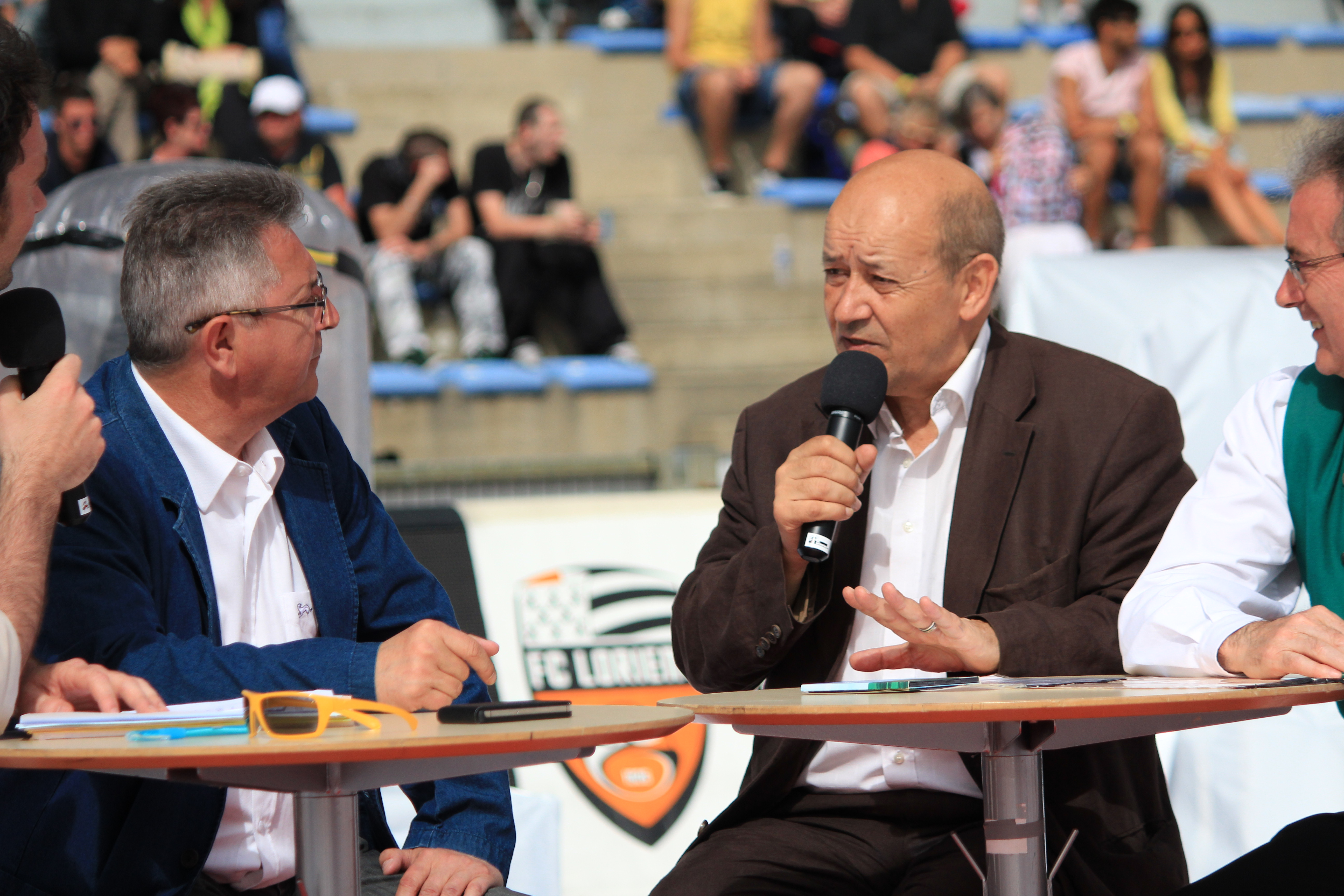 Le ministre de la Défense et ancien maire de Lorient Jean-Yves Le Drian lors du concour de bagadoù de 1ère catégorie 2012 à Lorient dans le cadre du festival interceltique de Lorient.